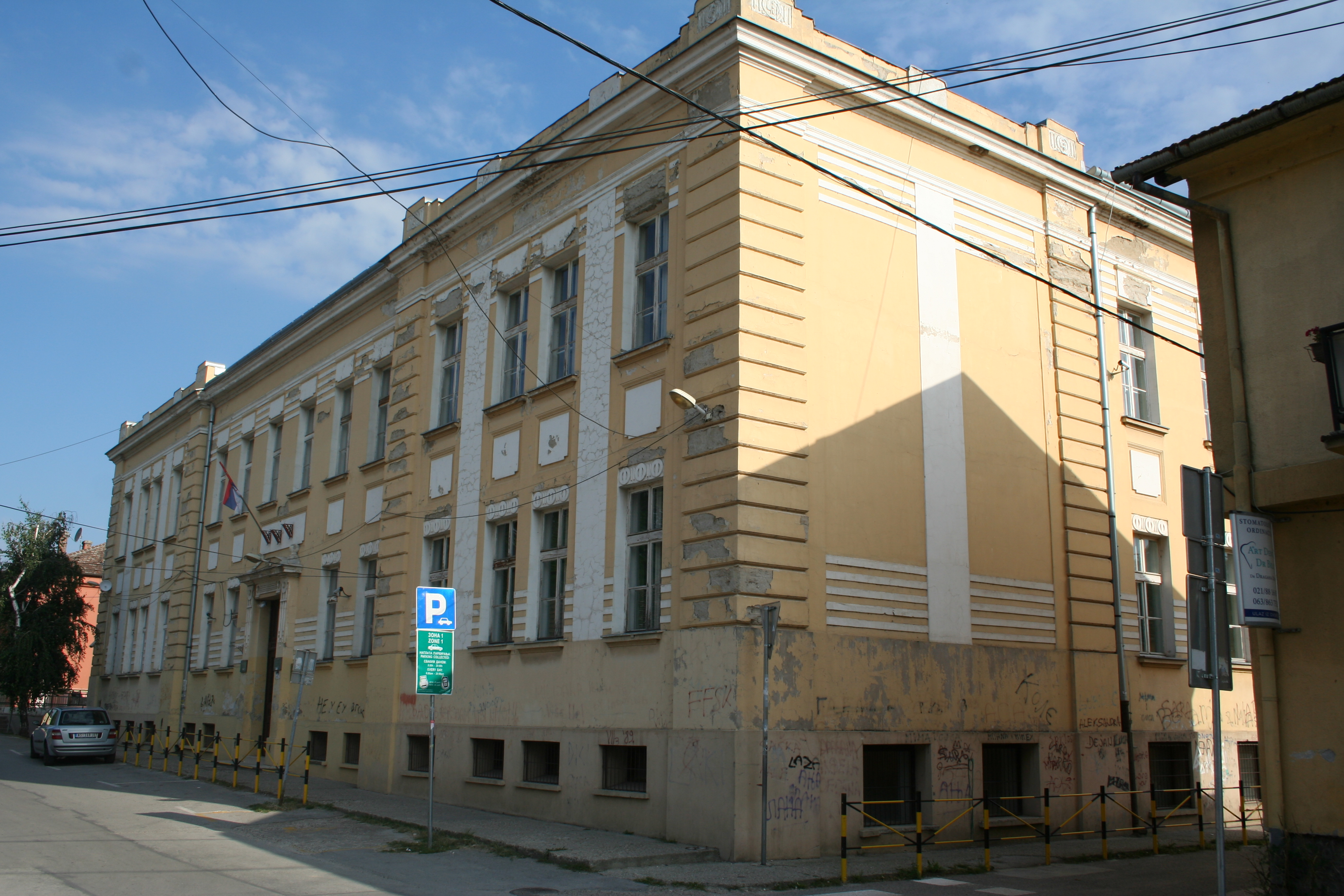 Gradsko jezgro (Sremski Karlovci)